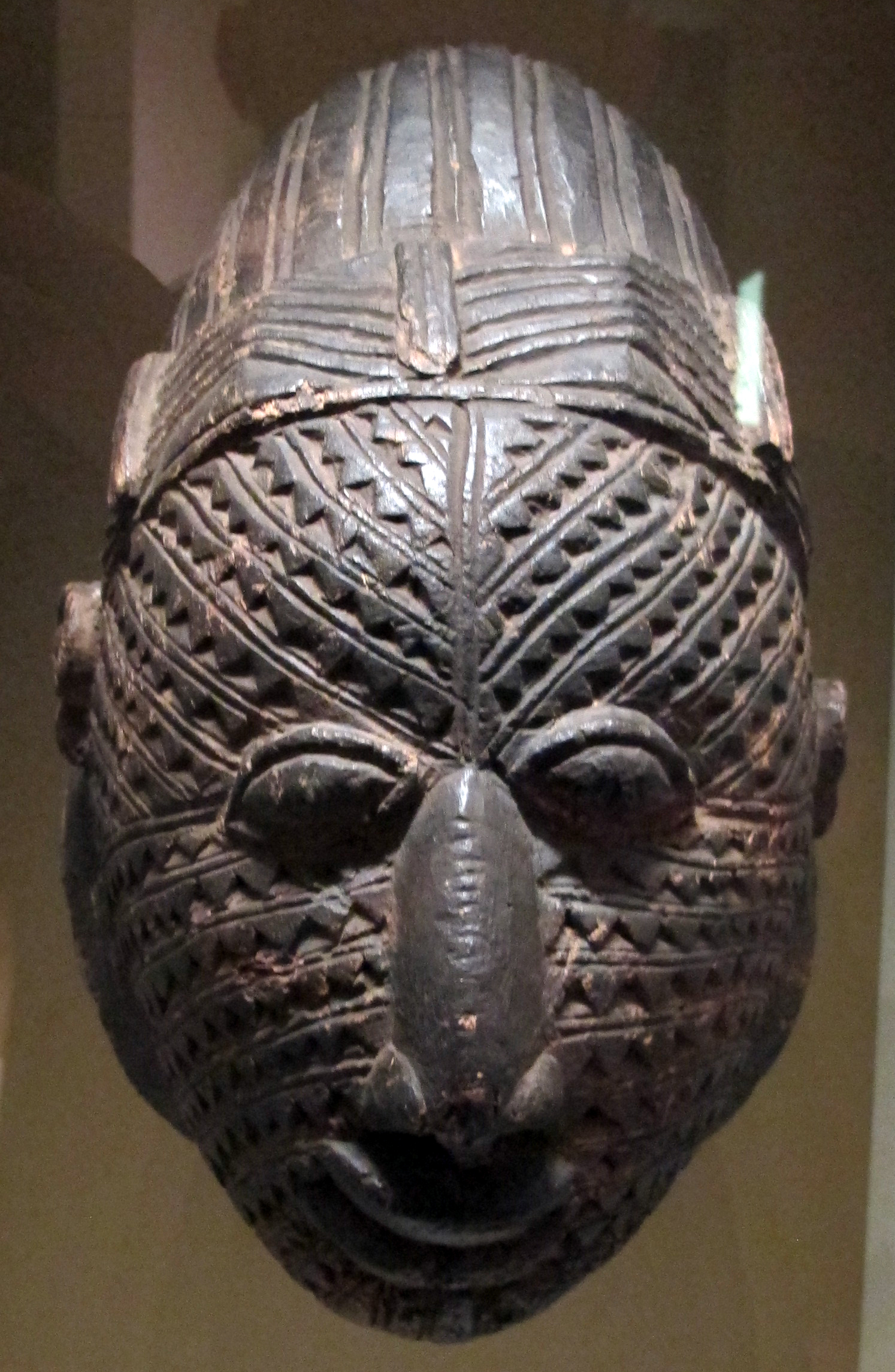 Musée du quai Branly